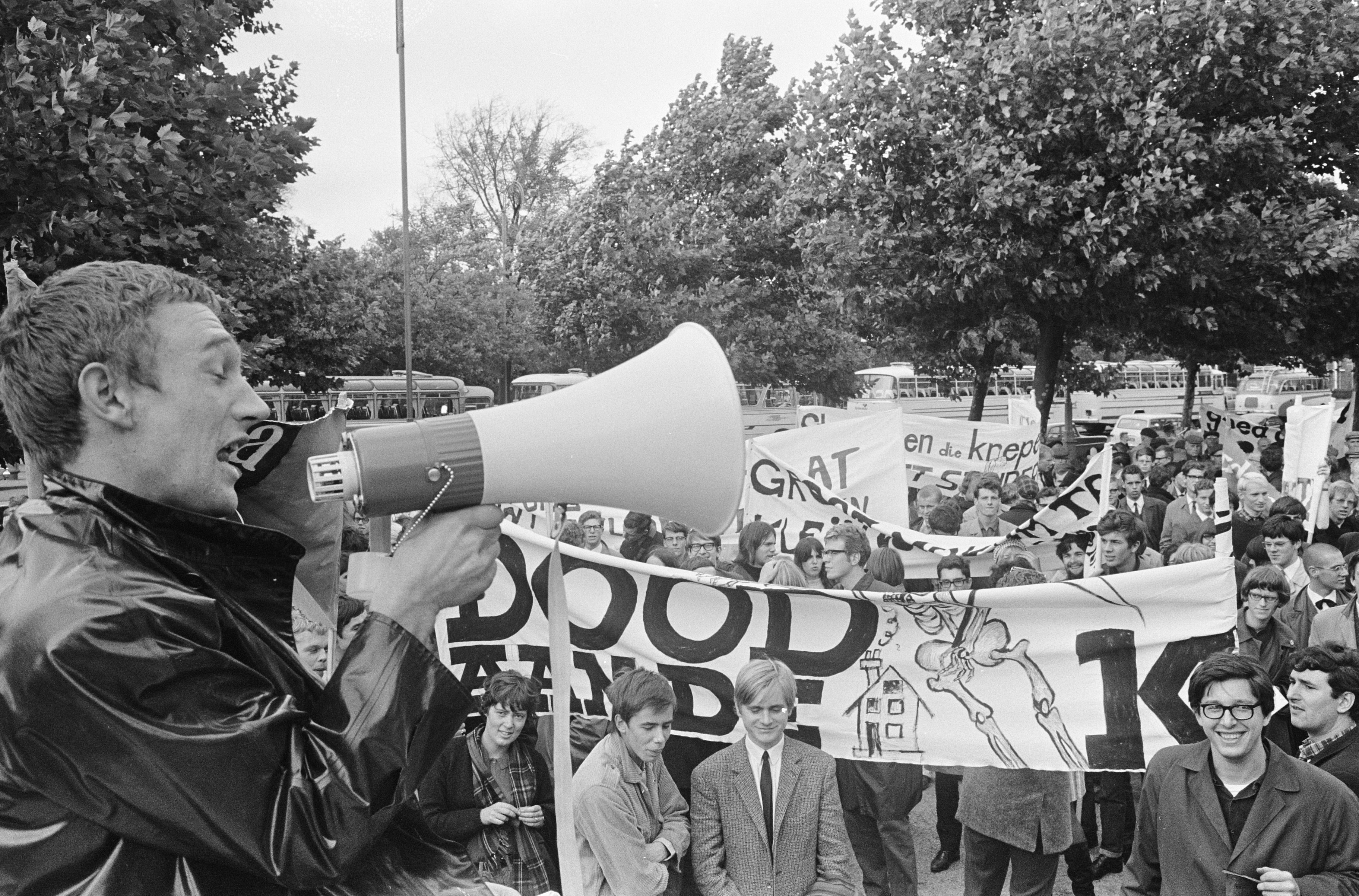 Collectie / Archief : Fotocollectie Anefo Reportage / Serie : Studentenprotest vanwege huisvestingtekort in Amsterdam Beschrijving : Han Meijer (voorzitter ASVA) spreekt de demonstrerende studenten toe op het Museumplein te Amsterdam Datum : 14 september 1966 Locatie : Amsterdam, Noord-Holland Trefwoorden : protesten, studenten, studentenhuisvesting Persoonsnaam : Meijer, Han Instellingsnaam : ASVA Fotograaf : Fotograaf Onbekend / Anefo Auteursrechthebbende : Nationaal Archief Materiaalsoort : Negatief (zwart/wit) Nummer archiefinventaris : bekijk toegang 2.24.01.05 Bestanddeelnummer : 919-5597